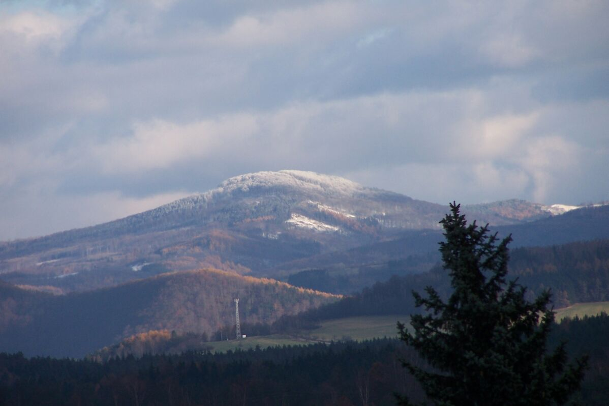 Pustý zámek pohled z Karlových Varů